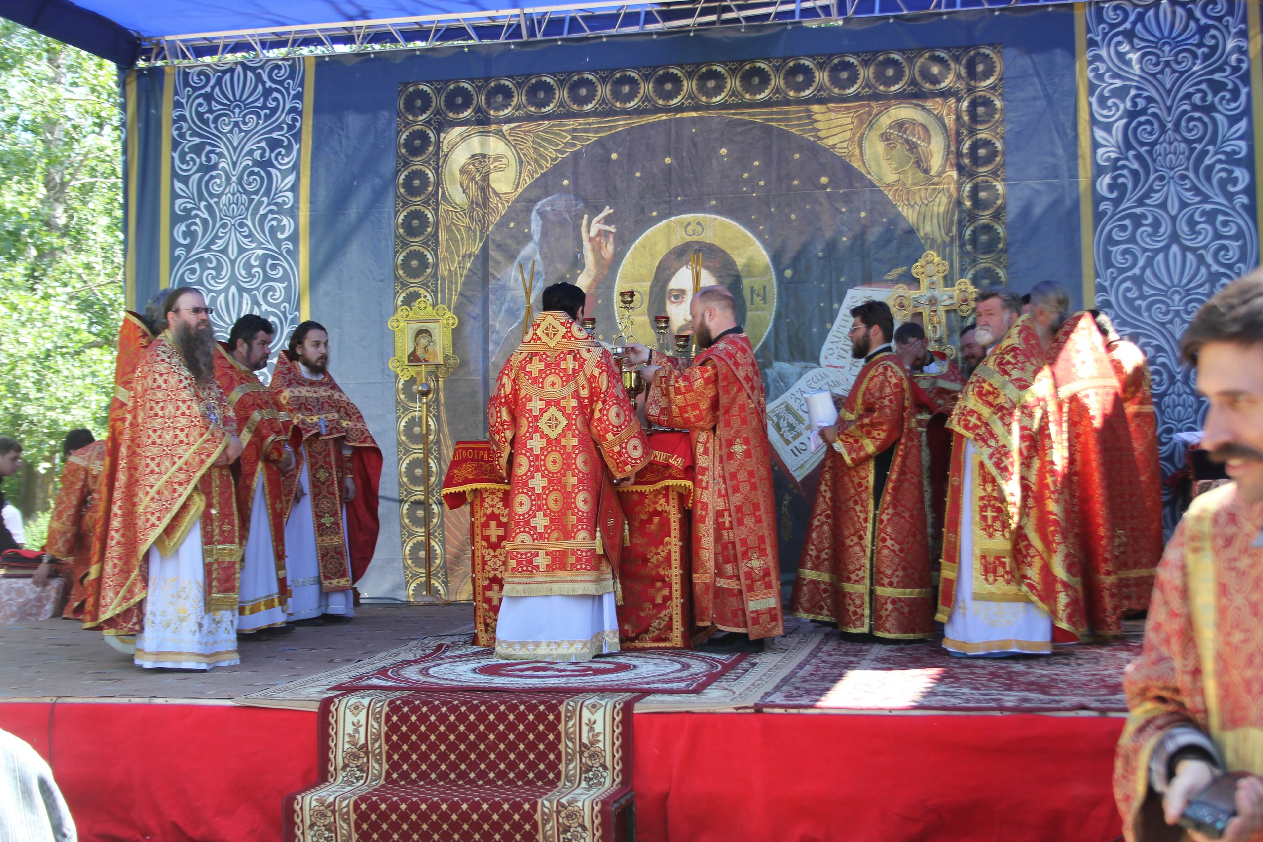 Зубовский Мироносицкий монастырь